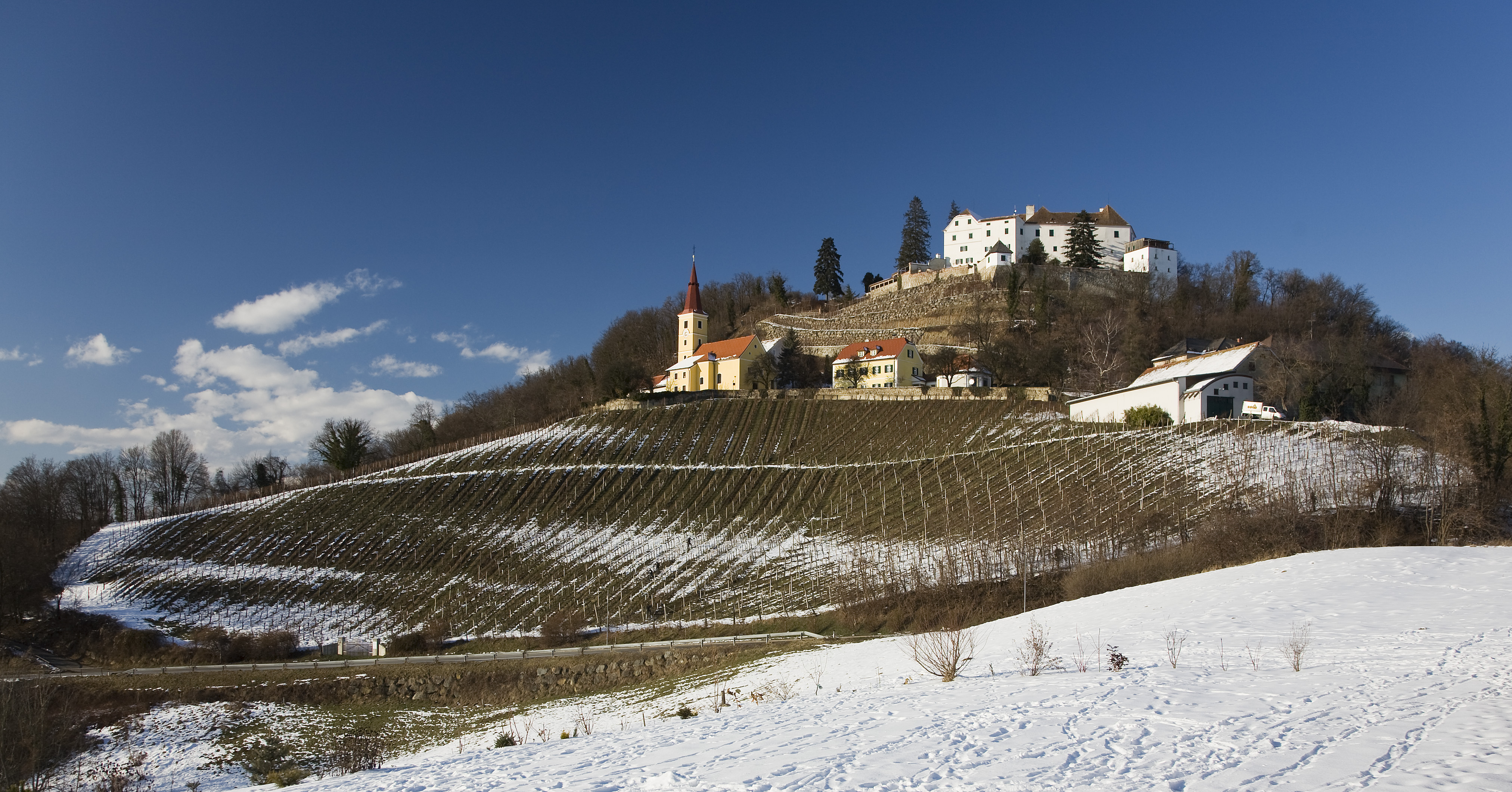 Blick auf die Burg Kapfenstein von Süden